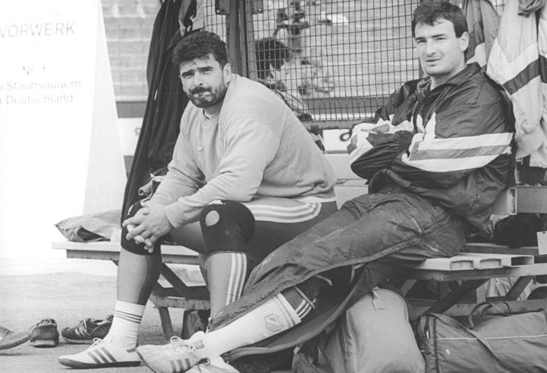 Kugelstoßer Ulf Timmermann und Udo Beyer ADN-Hirndorf-Erfurt: Leichtathletik- Das vermeintliche Kugelstoßduell zwischen Olympiasieger Ulf Timmermann (r) und Udo Beyer (l) lockte viele Zuschauer zur EM-Qualifikation ins Georgi-Dimitroff-Stadion. Timmermann (TSC Berlin) siegte sicher mit 21,50 Metern, Beyer (ASK Vorwärts Potsdam) belegte schließlich mit 20,04 Metern Platz 3. Abgebildete Personen: Beyer, Udo: Kugelstoßer, DDR Timmermann, Ulf: Kugelstoßer, Turn- und Sportclub (TSC) Berlin, Olympiateilnehmer 1988, DDR